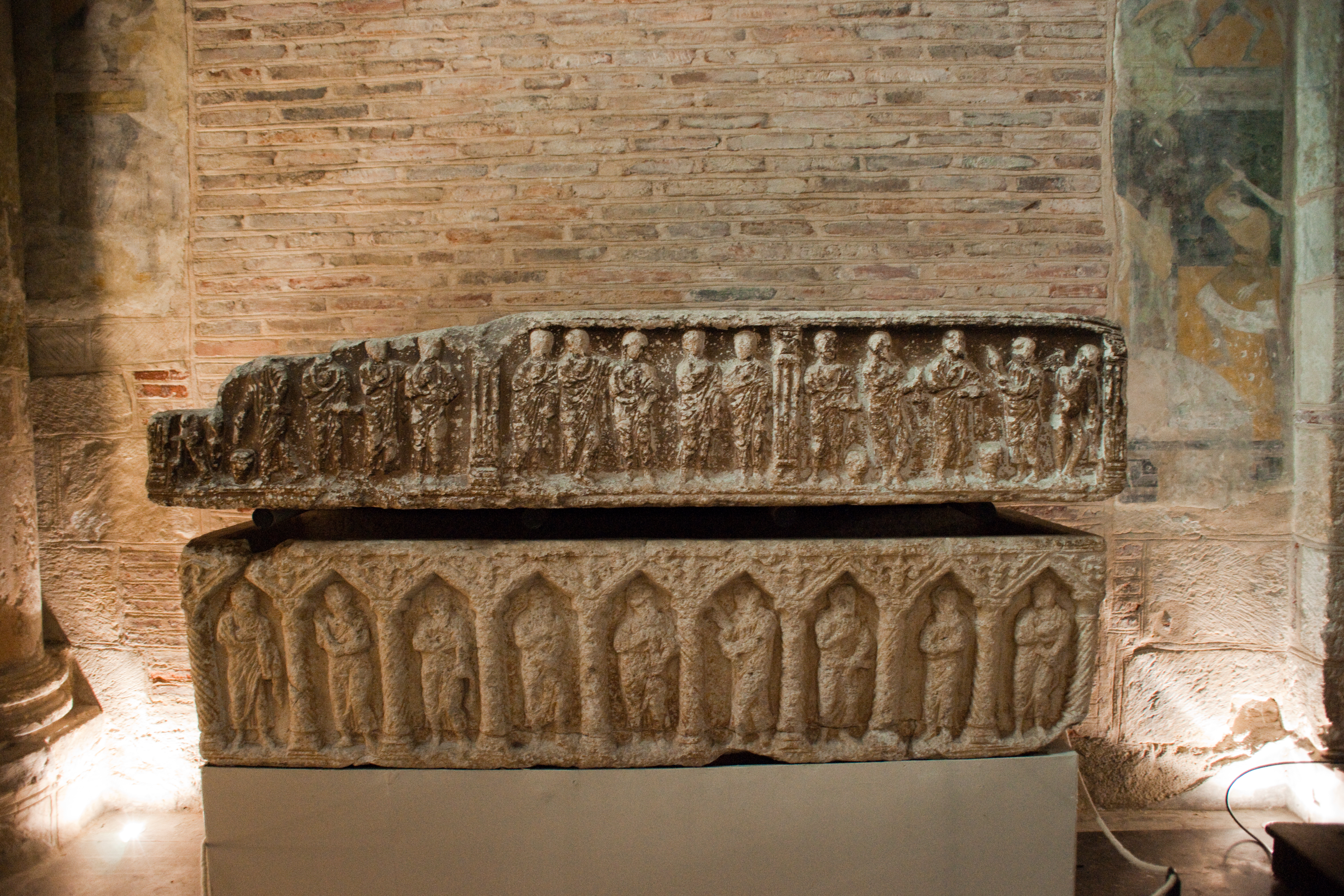 Sarcophage du IVe ou Ve siècle après J.-C., dans lequel ont été retrouvé des restes de plusieurs personnes ayant vécu du Xe au XIIe siècle, dont peut-être des comtes de Toulouse.